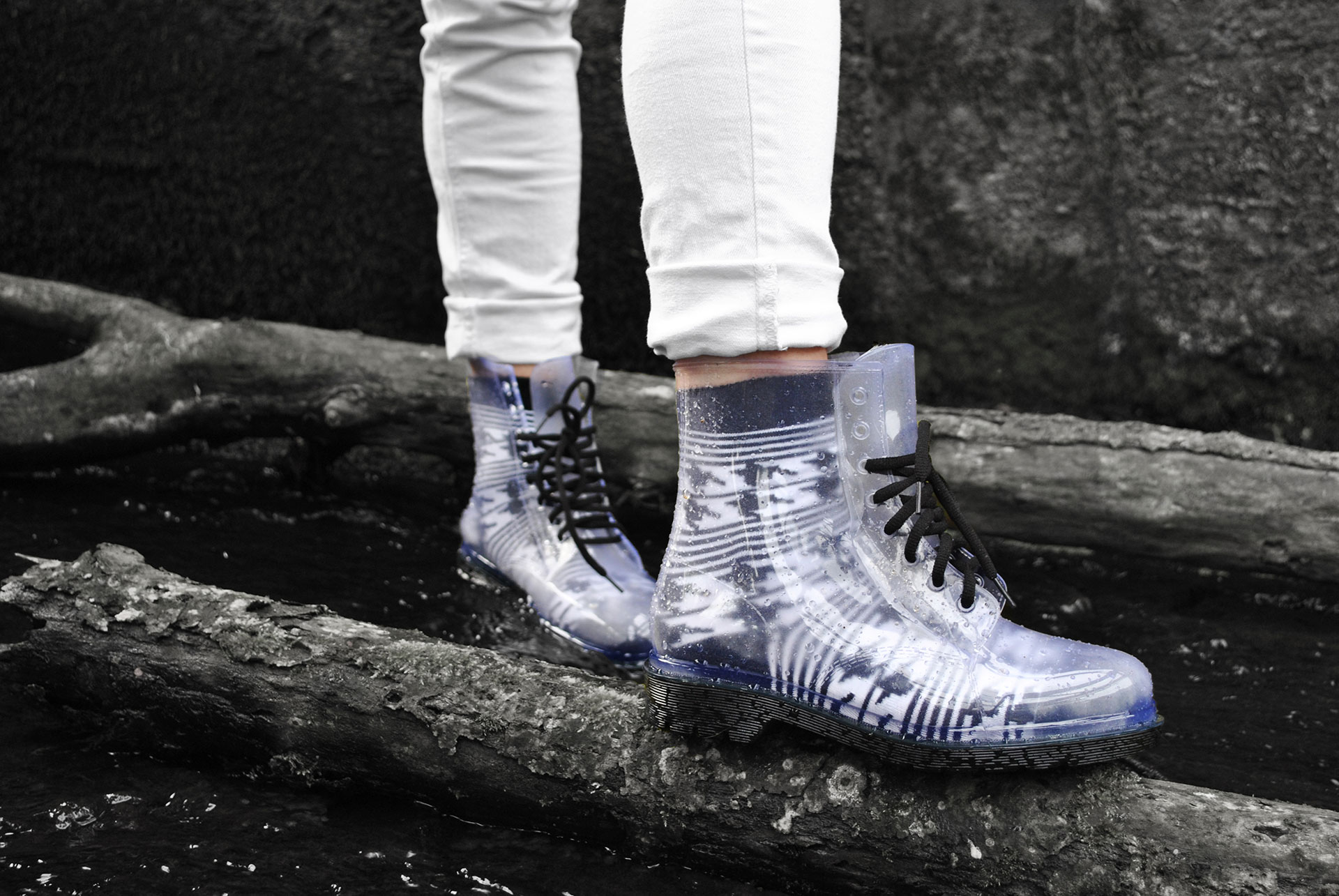 Moteriškos kojinės